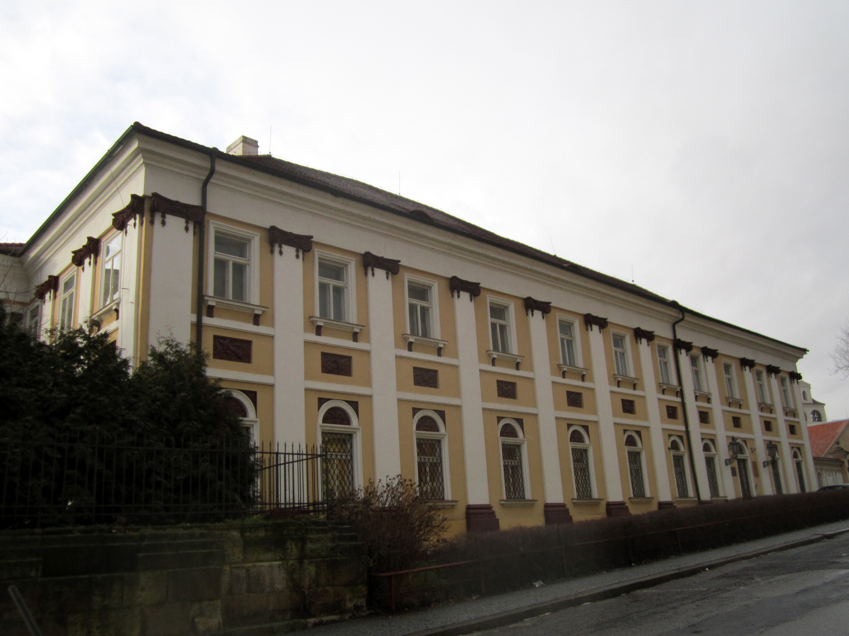 Hlavní budova Státního oblastního archivu v Litměřicích, dříve klášter dominikánů.